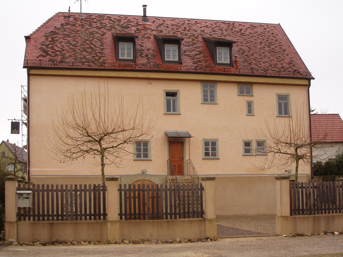 Historisches Gasthaus Krone (Seitenfassade) in Bad Rappenau-Bonfeld